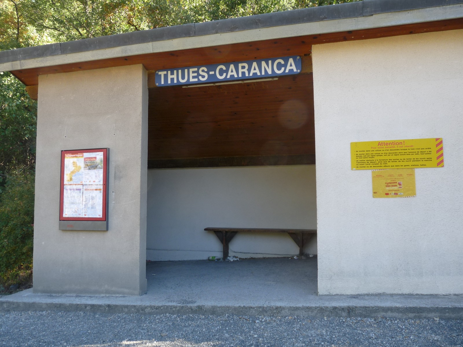 Gare de Thuès-Carança, Pyrénées-Orientales, France